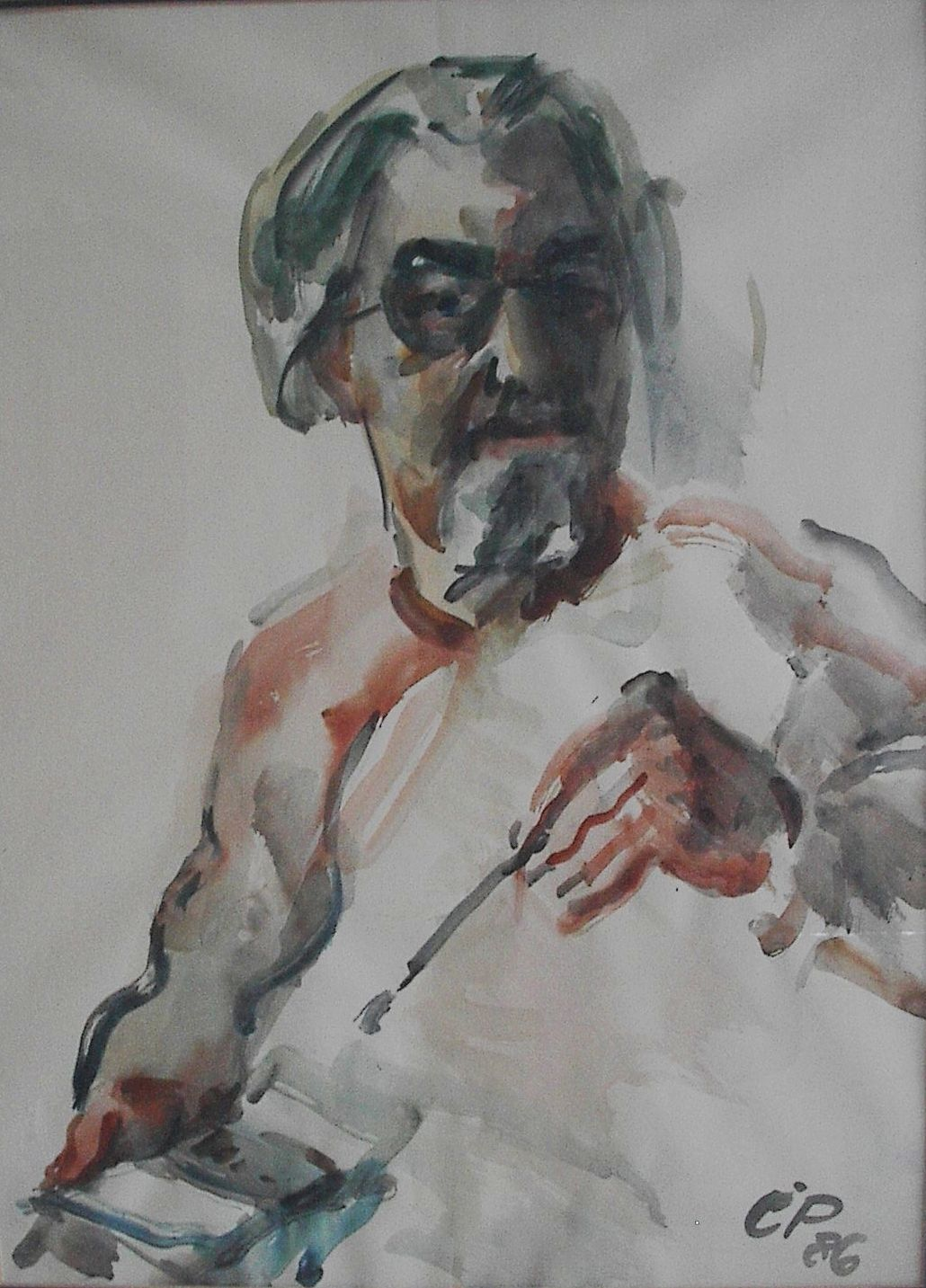 Carl Pflüger, Selbstbildnis, Aquarell